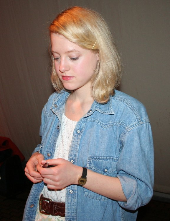 Schriftstellerin Julia Zange beim Literaturfest "lesen.hören" in der Mannheimer Alten Feuerwache